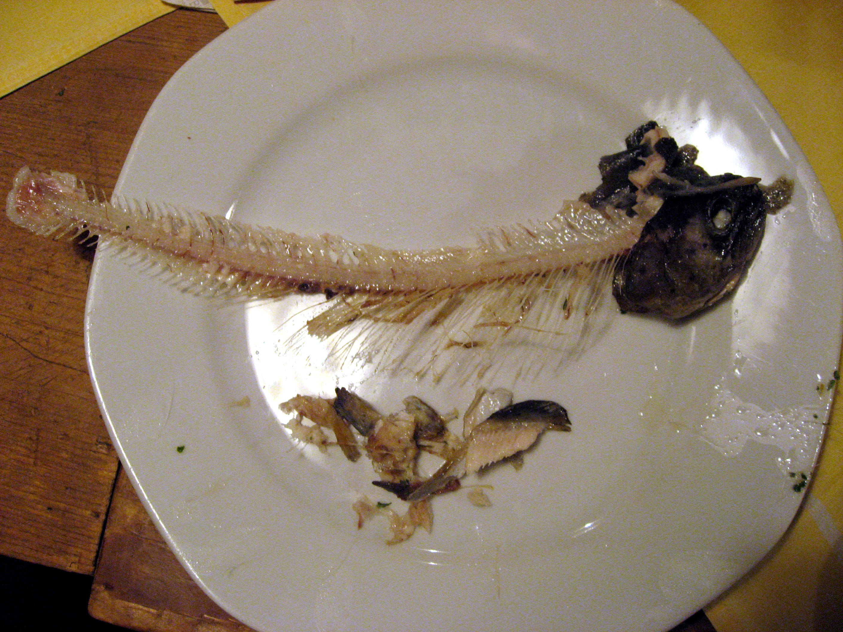 Rybí kostra na talíři